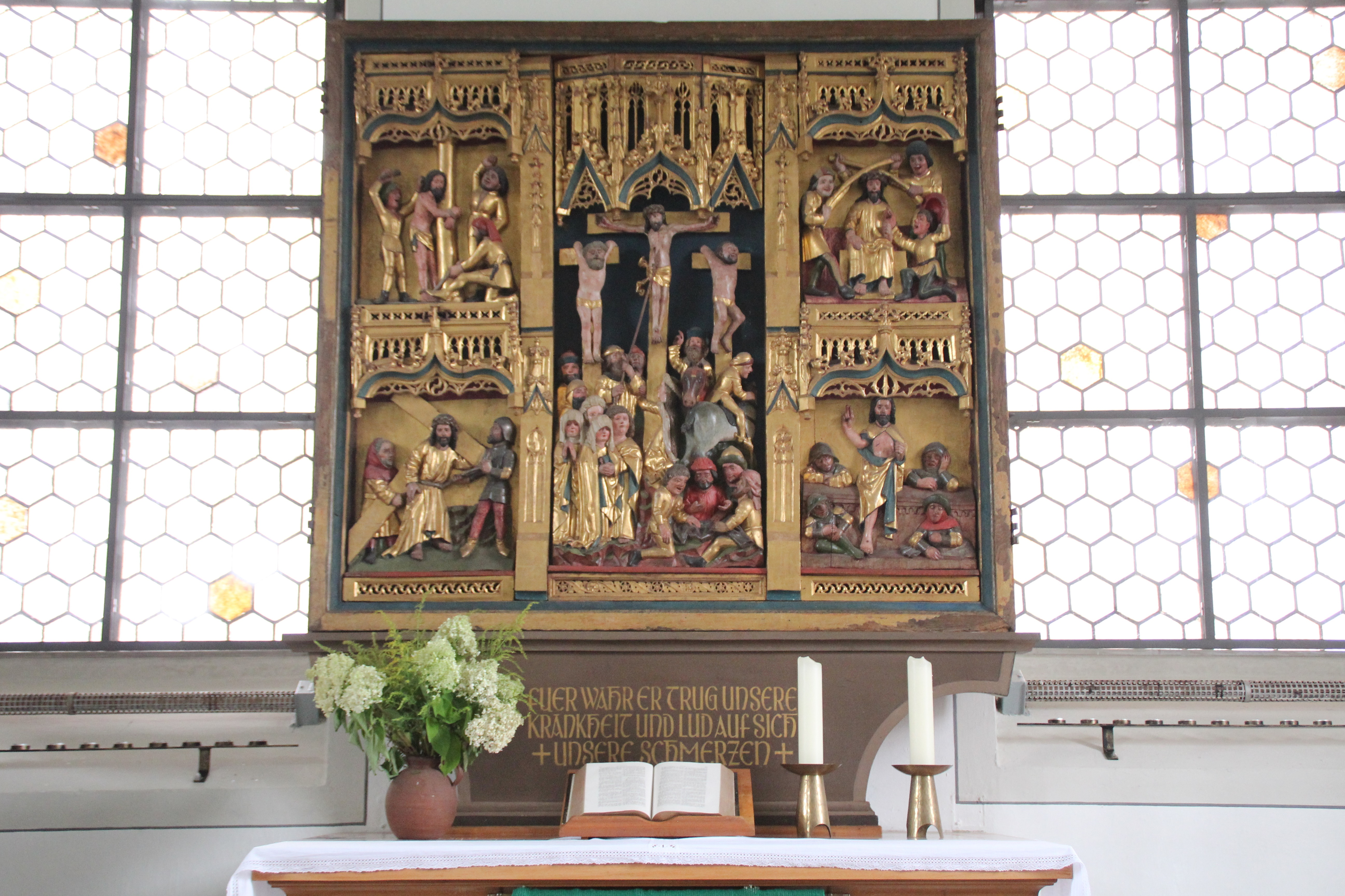 Schnitzaltar der evangelischen Martinskirche zu Marburg-Wehrda